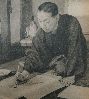 初代金剛巌